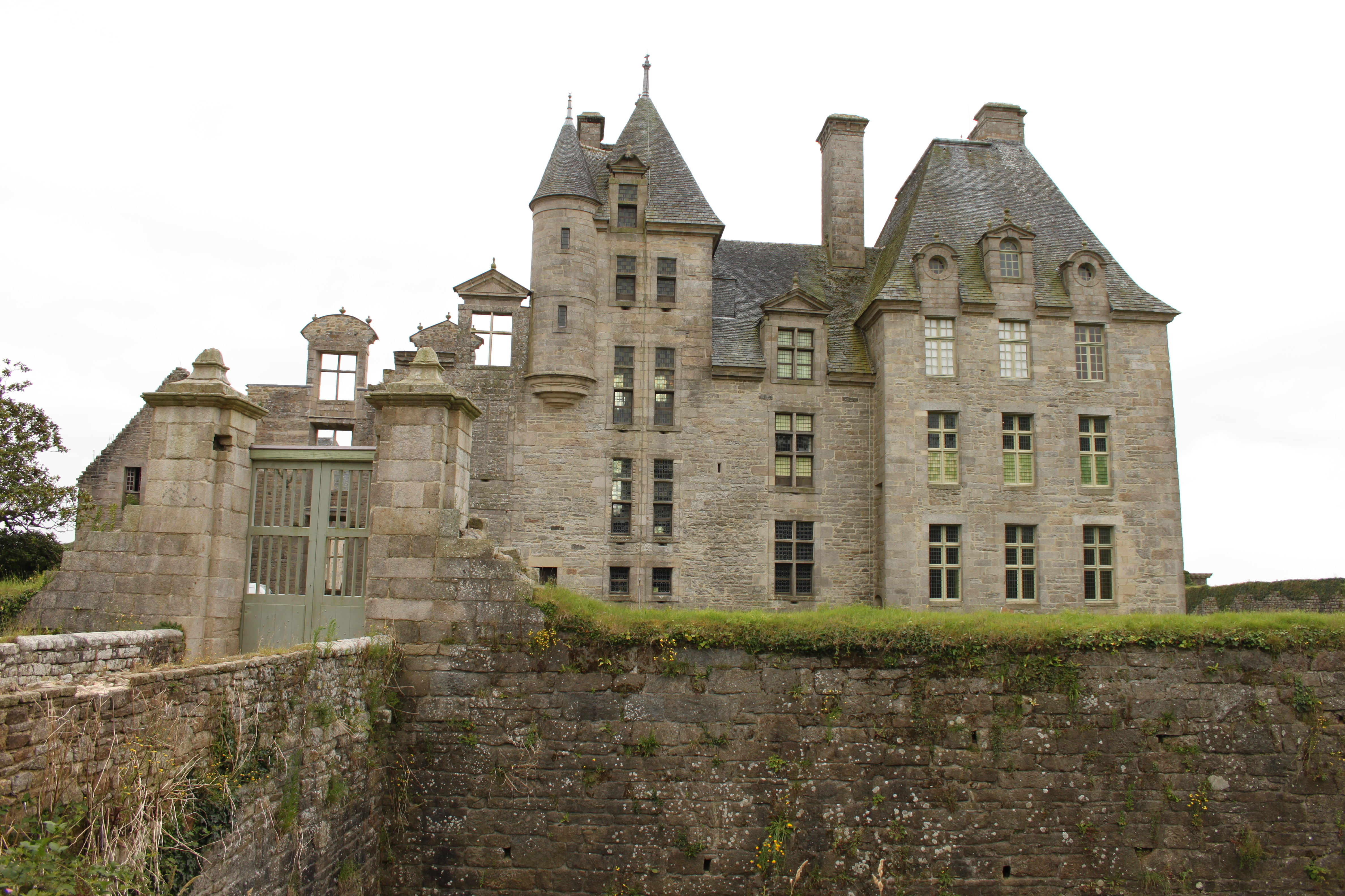 Le château de Kerjean, Bretagne